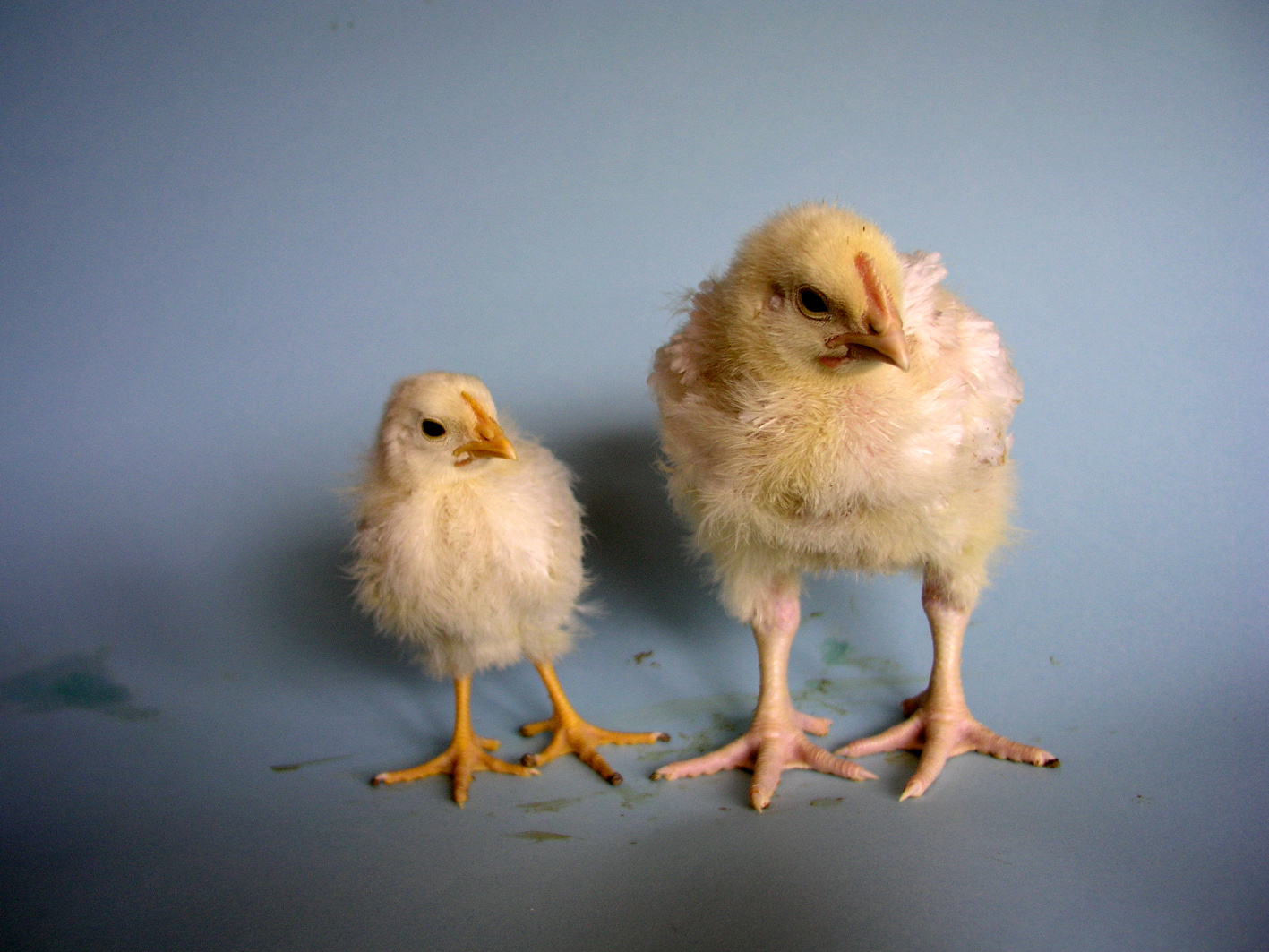 Das Bild ist Teil eines Bildvergleiches zweier zum gleichen Zeitpunkt geschlüpfte Küken einer Legehybridlinie (linkes Küken im Bild) und einer Masthybridlinie (rechtes Küken im Bild) im Alter von 3 bis 34 Tagen. Mit zunehmendem Alter wachsen die Tiere immer mehr auseinander. Nach vier Wochen wiegt ein Legeküken, das am selben Tag geschlüpft ist wie ein Mastküken, nur gerade halb soviel.Nach 40 Tagen, sind die Mastküken schon schlachtreif, die Legeküken haben noch kaum Fleisch angesetzt. Das Mastküken ist schon vor Ende der Mastzeit nicht mehr fähig, für eine Foto ruhig neben dem Legeküken zu stehen. Es wiegt zuletzt rund 1,8 kg und kann seinen enormen Fleischberg und die übermässige Brust kaum mehr tragen und sinkt immer gleich nieder ein. Beschreibung und Bilder stammen aus folgendem Artikel: 3. Tag 12. Tag 18. Tag 29. Tag 34. Tag